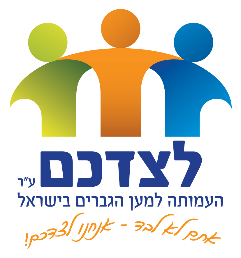 לוגו עמותת לצדכם